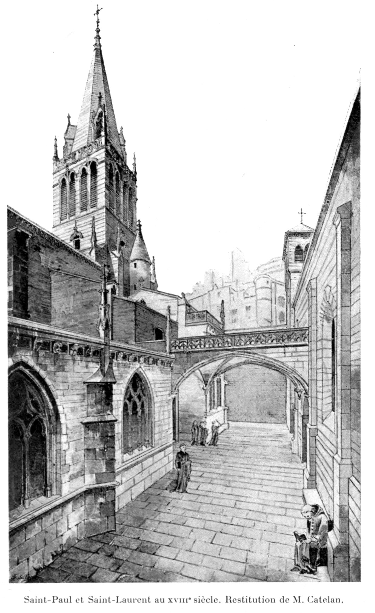 Illustration pour l'Histoire des églises et chapelles de Lyon